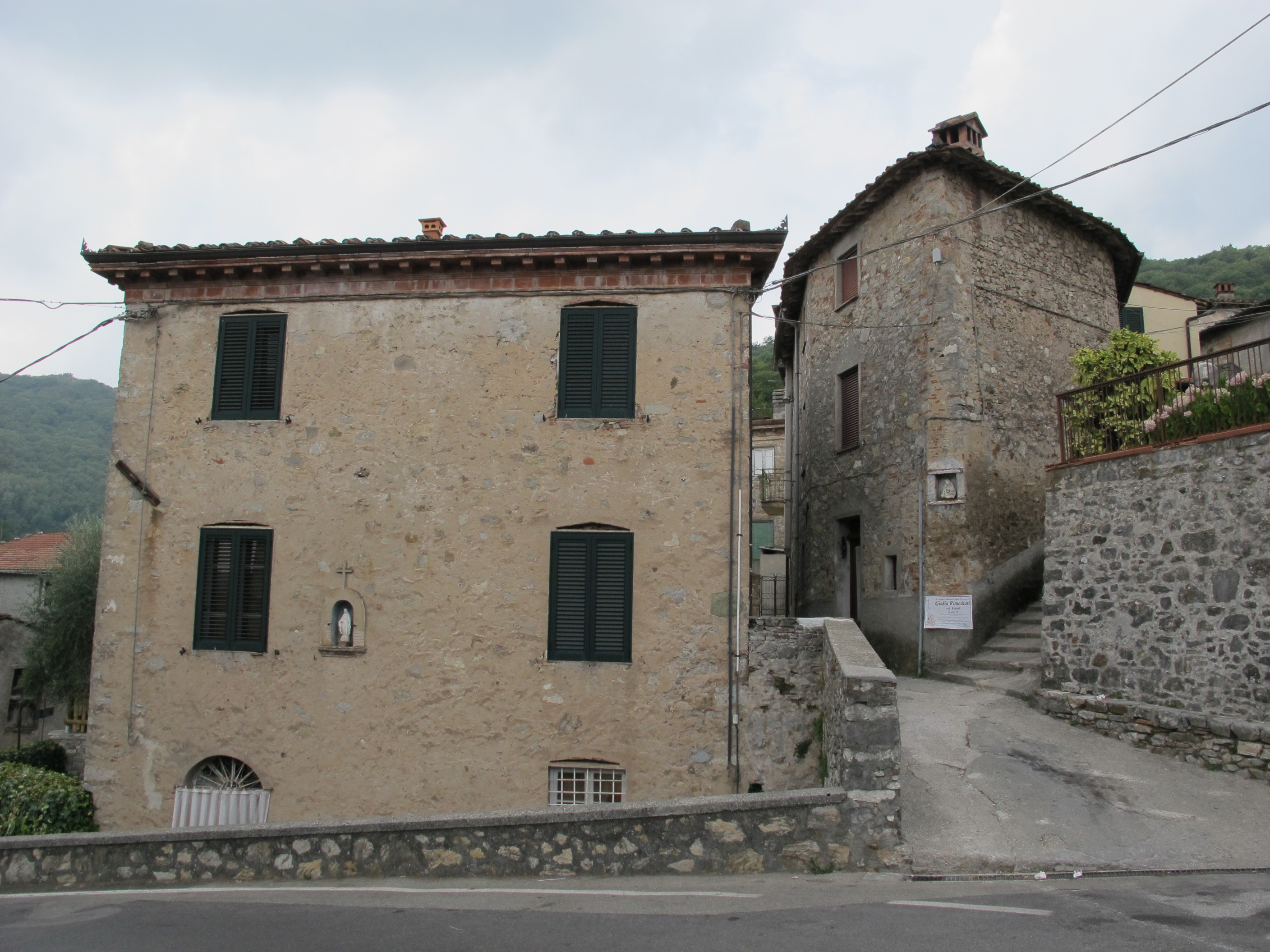 Fiano di pescaglia, scorcio